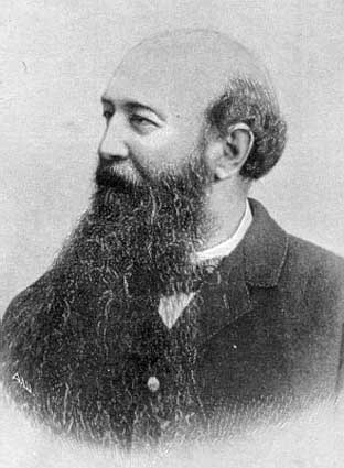 Иван Ястребов